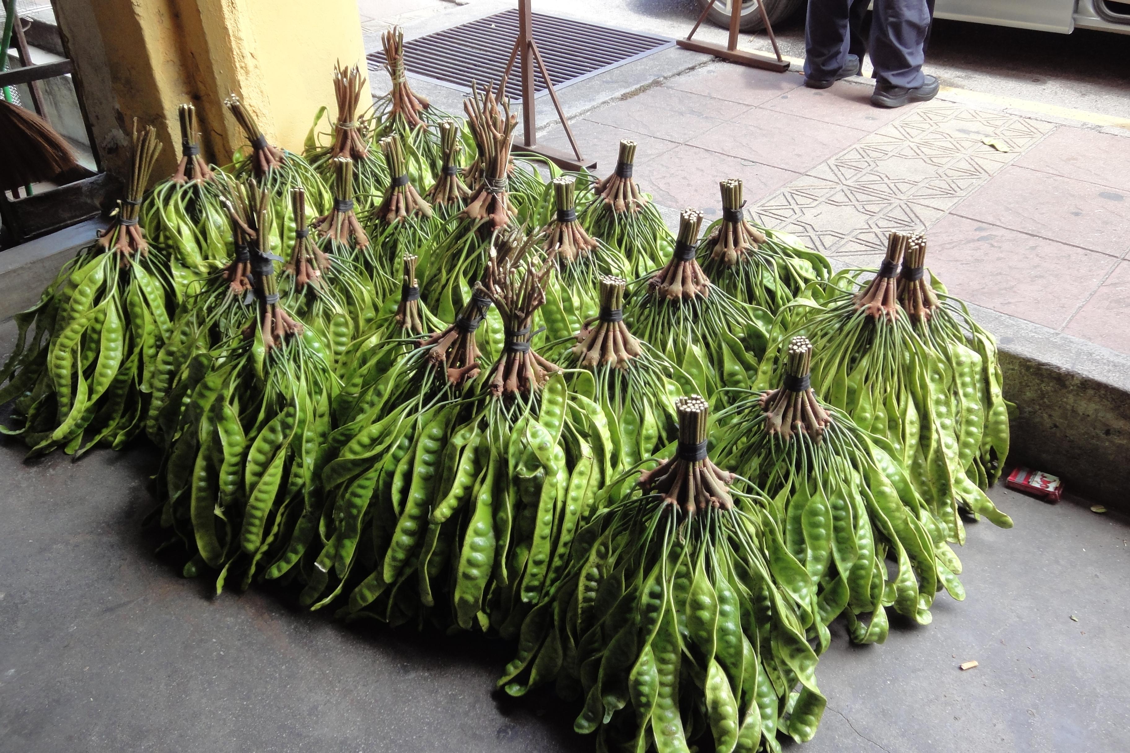 Parkia speciosa in Malaysia